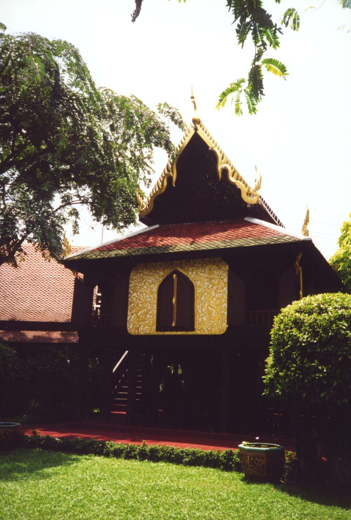 Suan Pakkard palace in Bangkok, Thailand